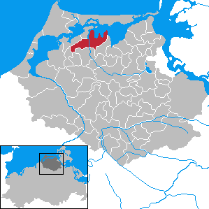 Barth in Mecklenburg-Vorpommern - District Nordvorpommern